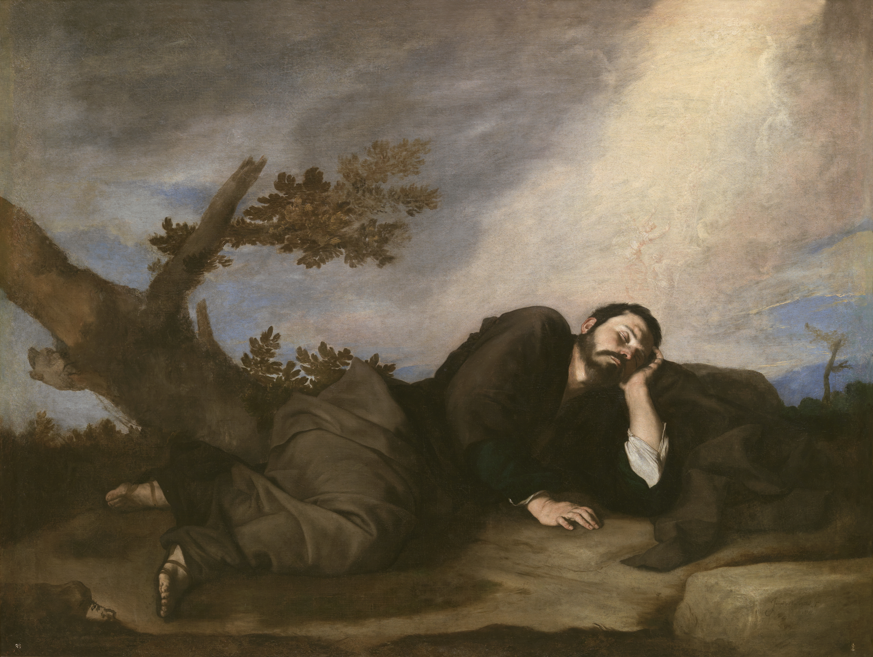 El cuadro narra el sueño misterioso del patriarca Jacob, según relata el Génesis, quien aparece dormido, recostado sobre el brazo izquierdo. Detrás de él se encuentra un árbol y al otro lado la escala de luz por la que suben y bajan los ángeles. El asunto muestra la capacidad técnica de Ribera para construir un discurso metafórico. A través de la representación de un pastor tendido a descansar en el campo describe uno de los episodios bíblicos más conocidos. La visión en primer plano del personaje sólidamente construido y los rasgos realistas de la escena sirven para hacer verídico el sueño milagroso, que se describe en un haz de luz bajo un cielo azul y gris. Ribera da aquí una de sus numerosas pruebas de su delicado sentido del color y su exquisita capacidad para la composición, al contraponer en diagonal los volúmenes del primer plano. Probablemente se trate de uno de los cuadros que se citan en 1658 en el inventario de don Jerónimo de la Torre, permaneciendo en poder de su familia hasta 1718. En 1746 reapareció entre las pinturas de la reina Isabel de Farnesio con atribución a Murillo.